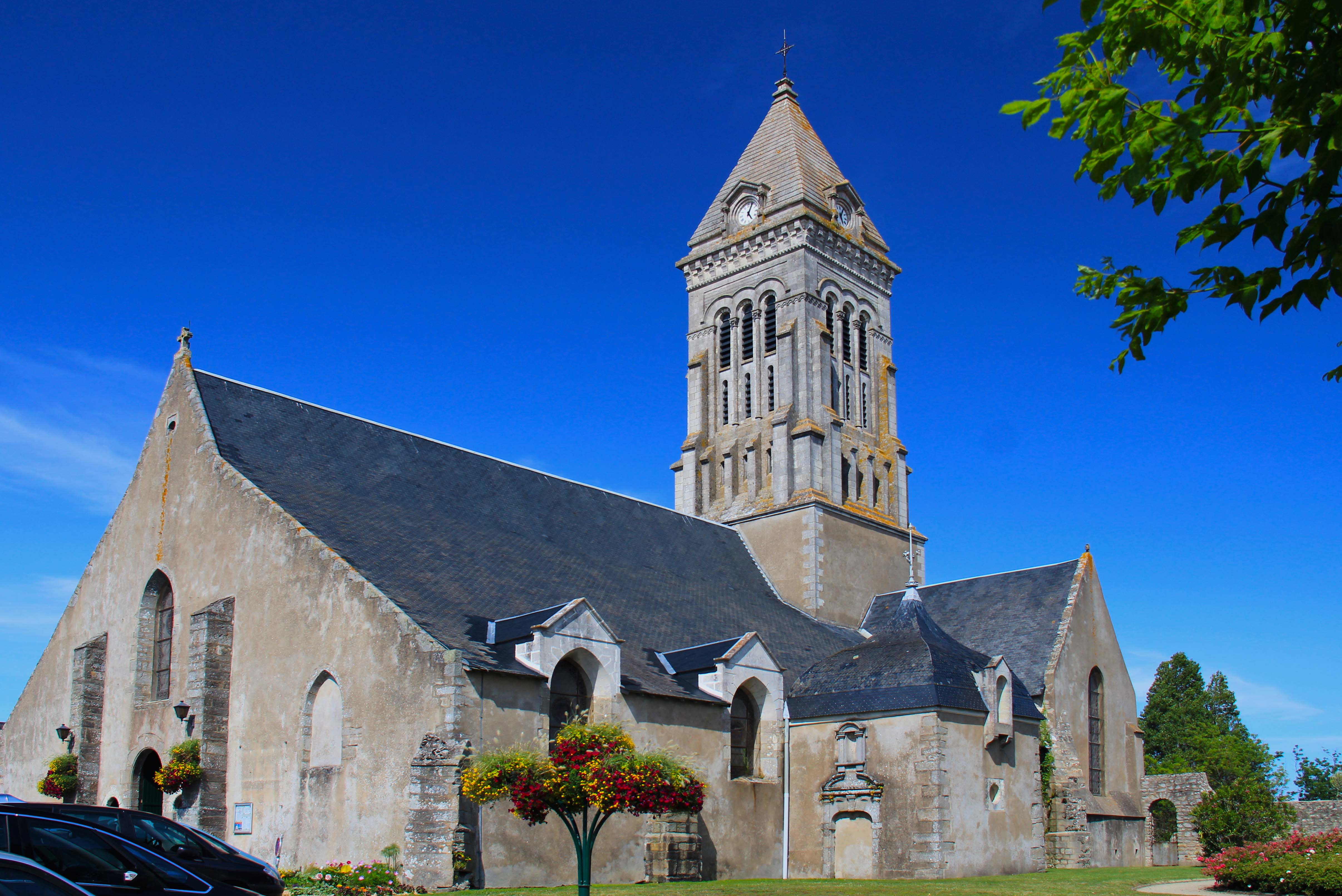 Eglise paroissiale de Noirmoutier